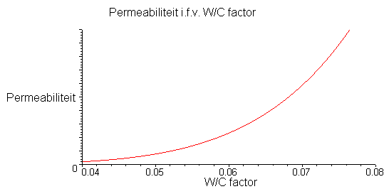 permeabiliteit ifv W_C zelf, Maple 9.5~ MADe 16 jun 2005 17:05 (CEST)